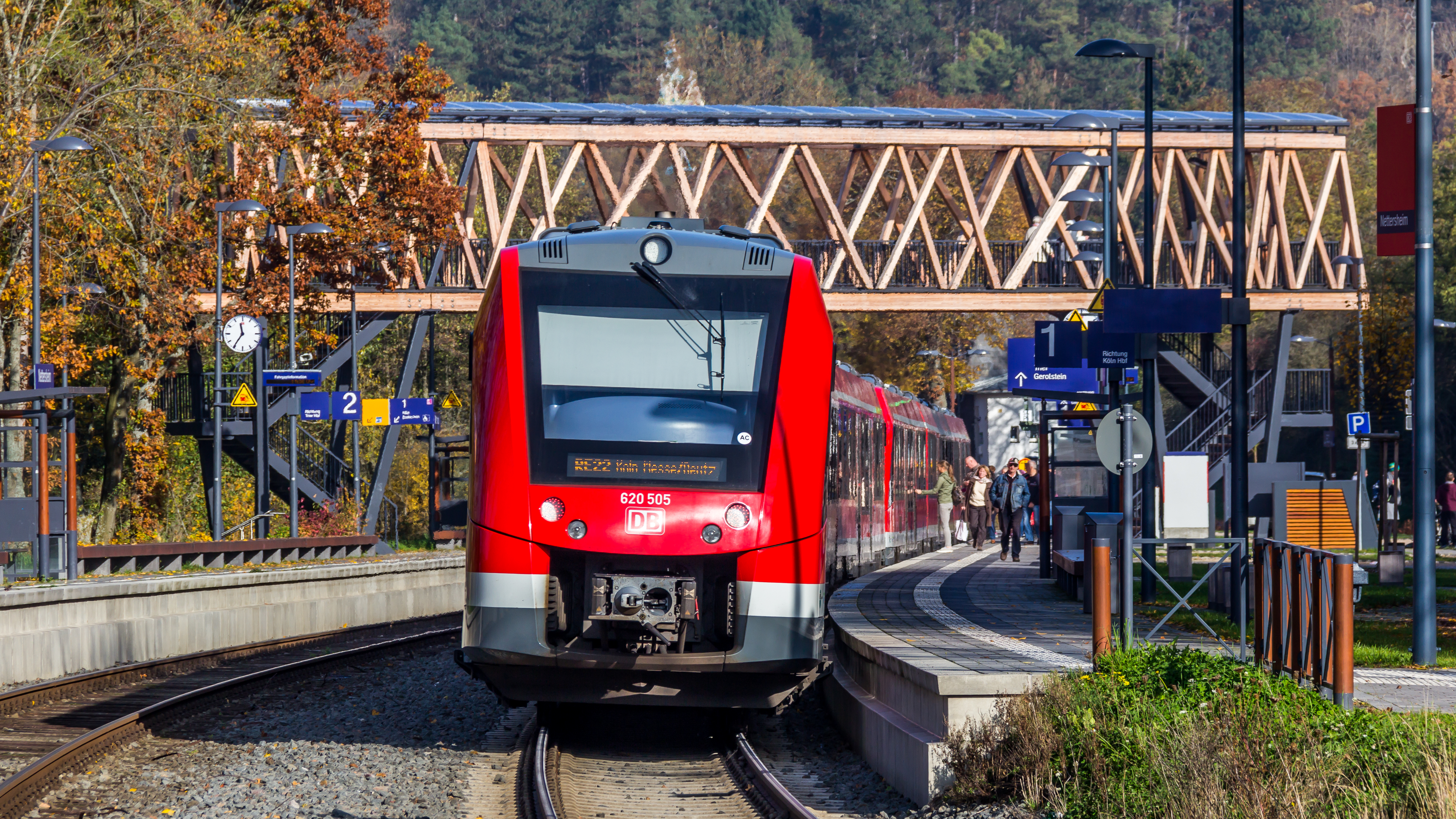 Der RE 22 (Fahrtrichtung Köln Messe/Deutz) im modernisierten Bahnhof Nettersheim, Eifel